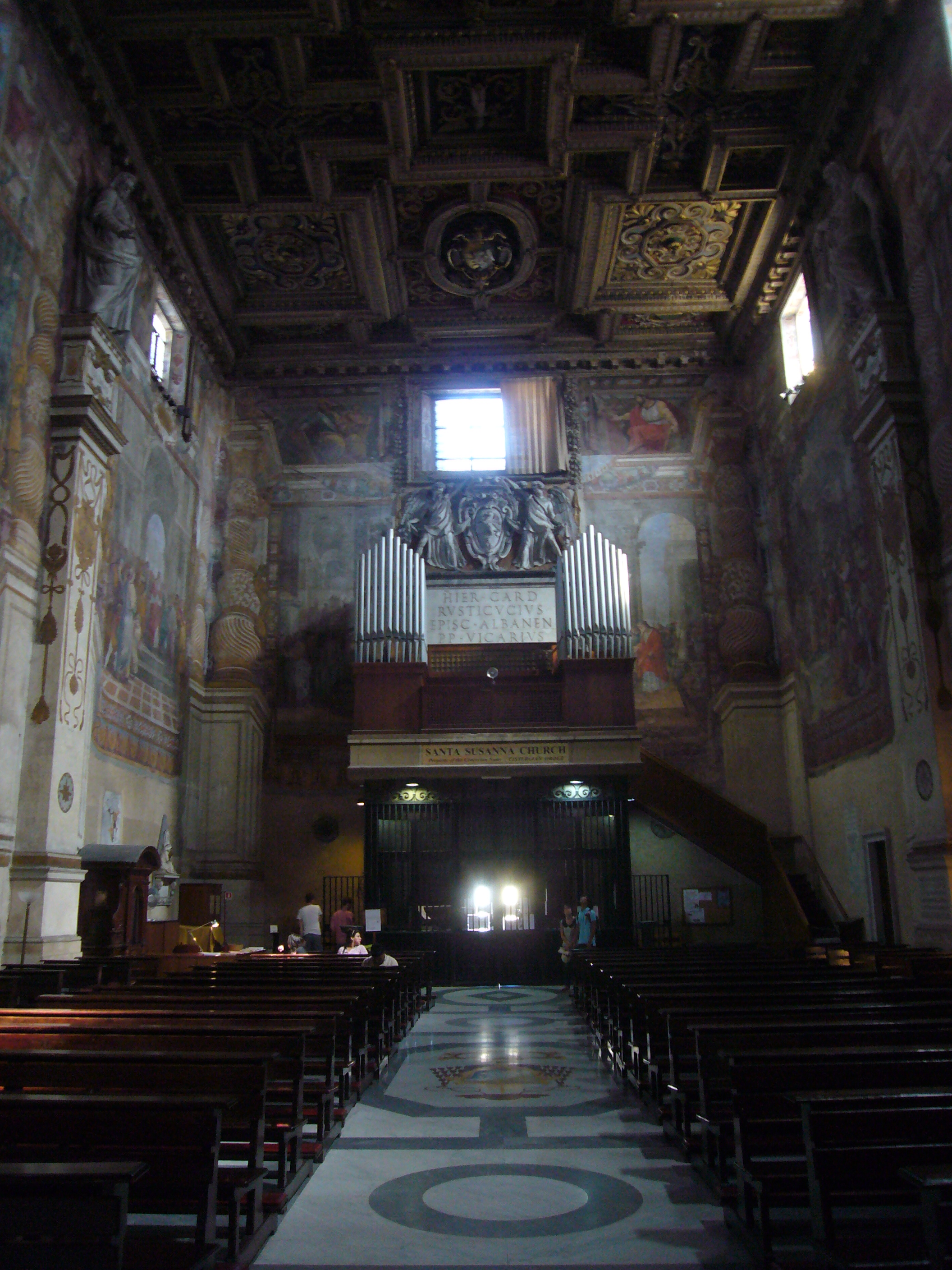 Roma, santa Susanna alle Terme di Diocleziano, controfacciata e organo